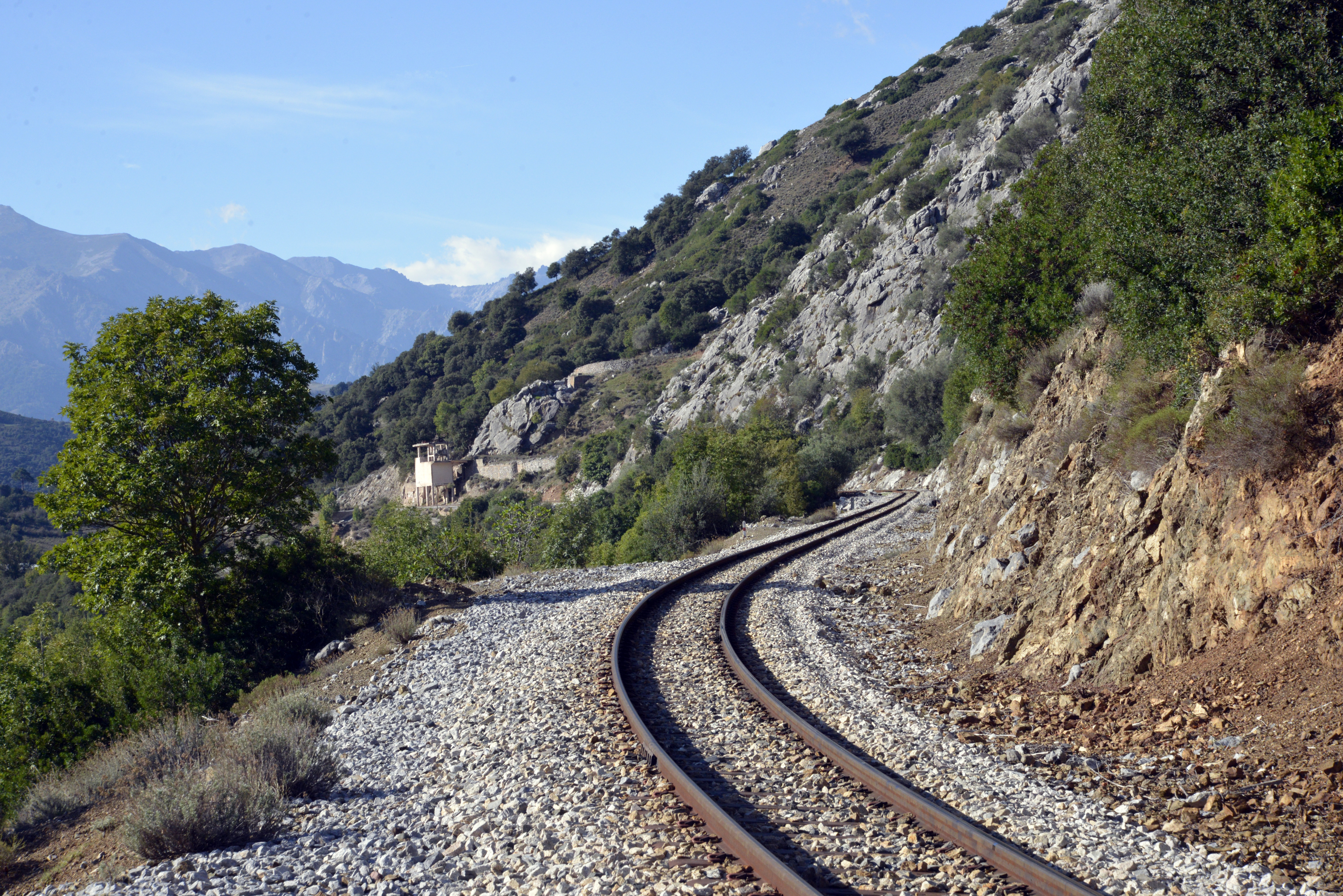 Omessa, Talcini (Haute-Corse) - La voie ferrée de la ligne de Bastia à Ajaccio longeant le Monte a Supietra peu avant le site de l'ancienne carrière de calcaire de Caporalino